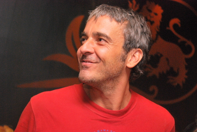 O ator Alexandre Borges em uma balada em março de 2011.